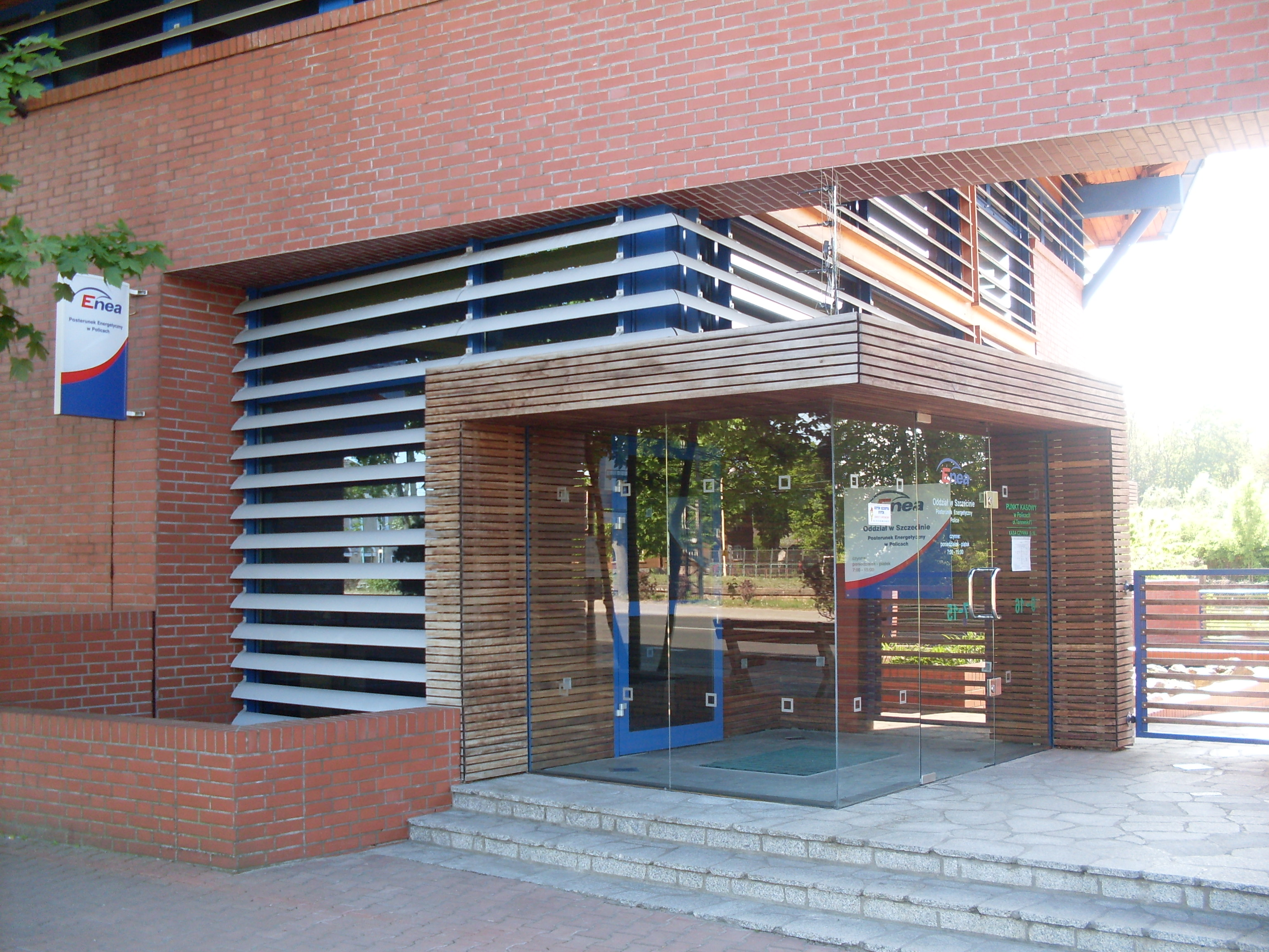 Siedziba Enea S.A. w Policach